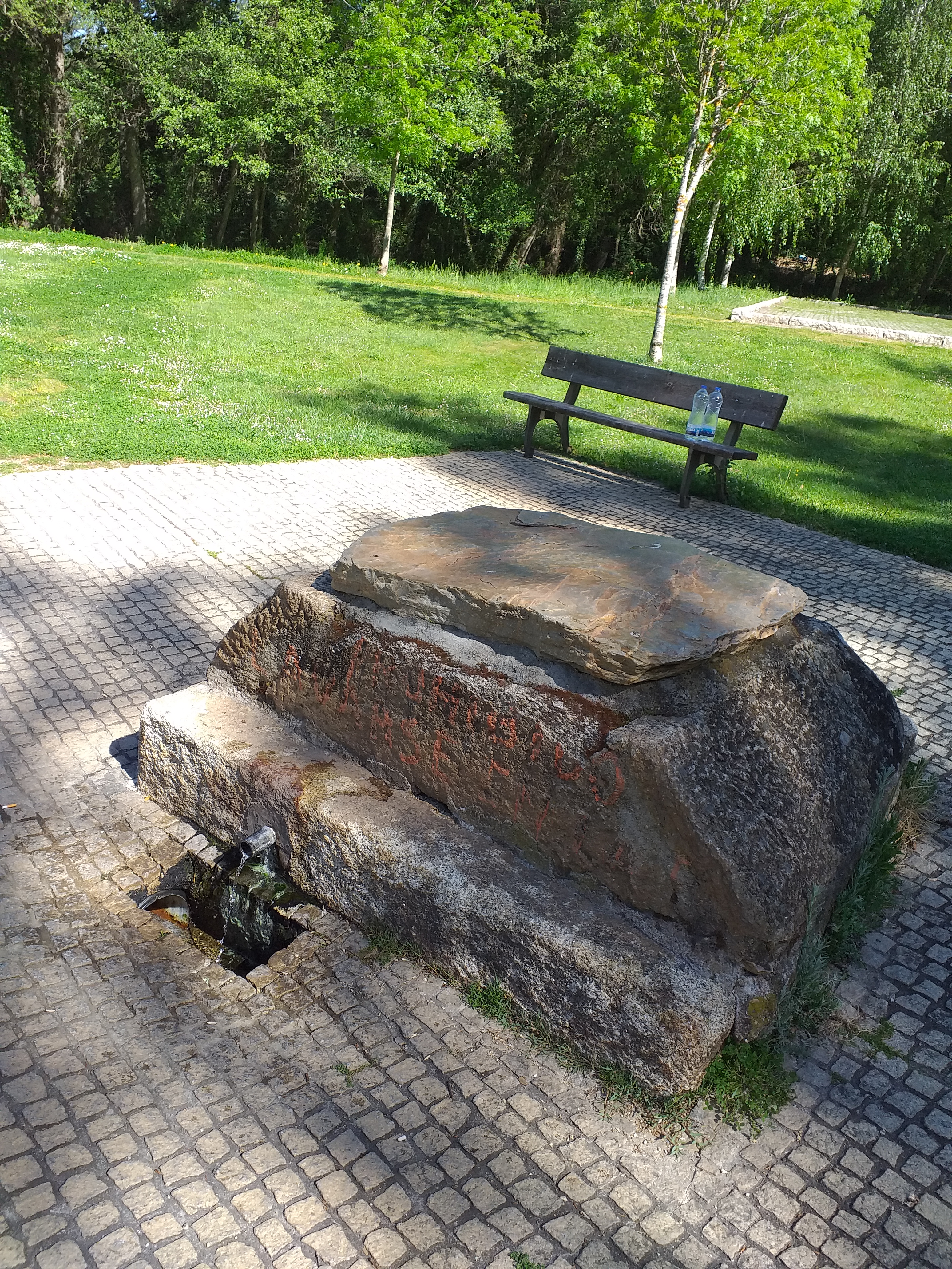 A auga da Fonte do Sapo